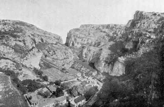 Cheddar Village - Mendip Hills - Somerset - England